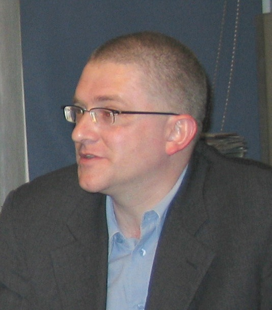 Grzegorz Braun (reżyser)